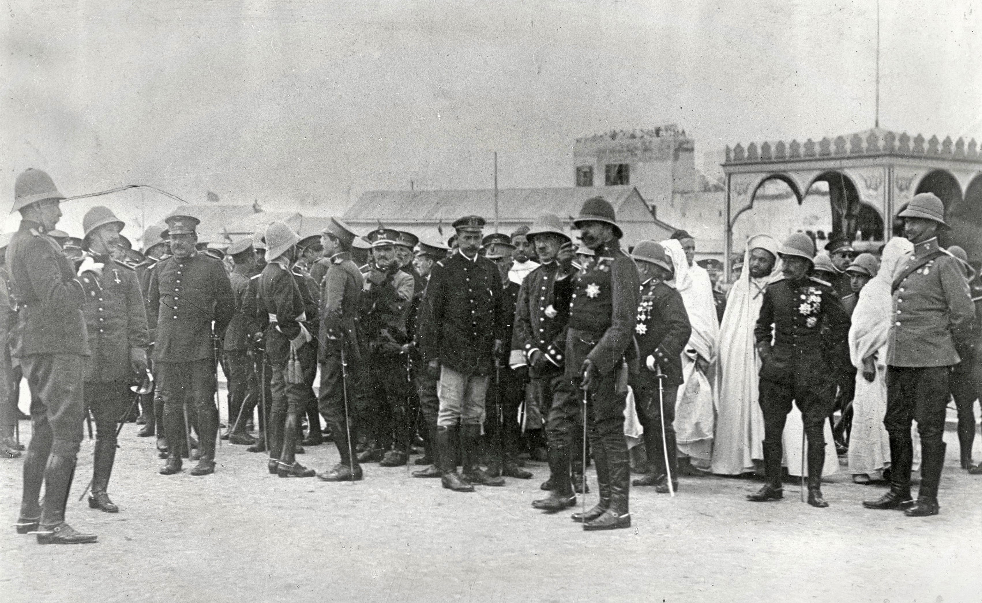 Militares españoles con salacots en el norte de África